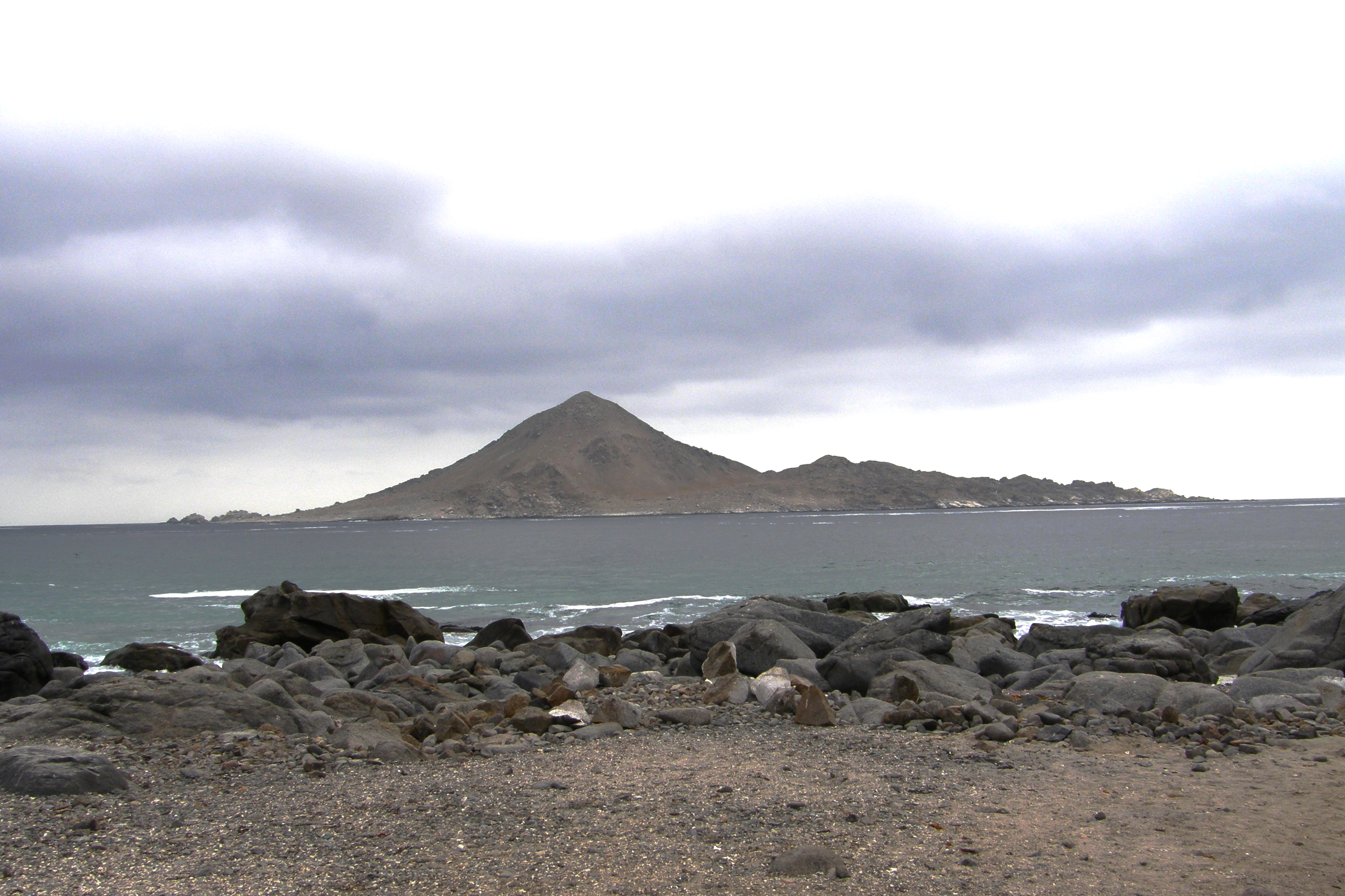 Isla Pan de Azucar, Province de Chañaral, region III (Atacama), Chili.